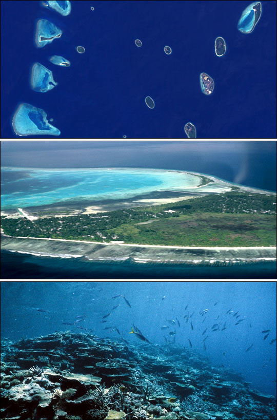 Коралові Атоли. Мальдіви.